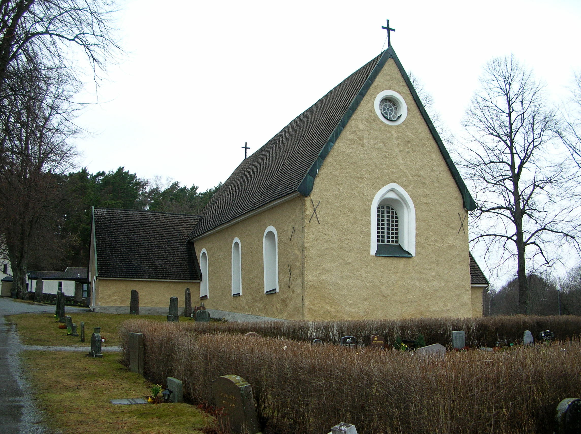 Hammarby kyrka, Sollentuna, Diocese of Stockholm